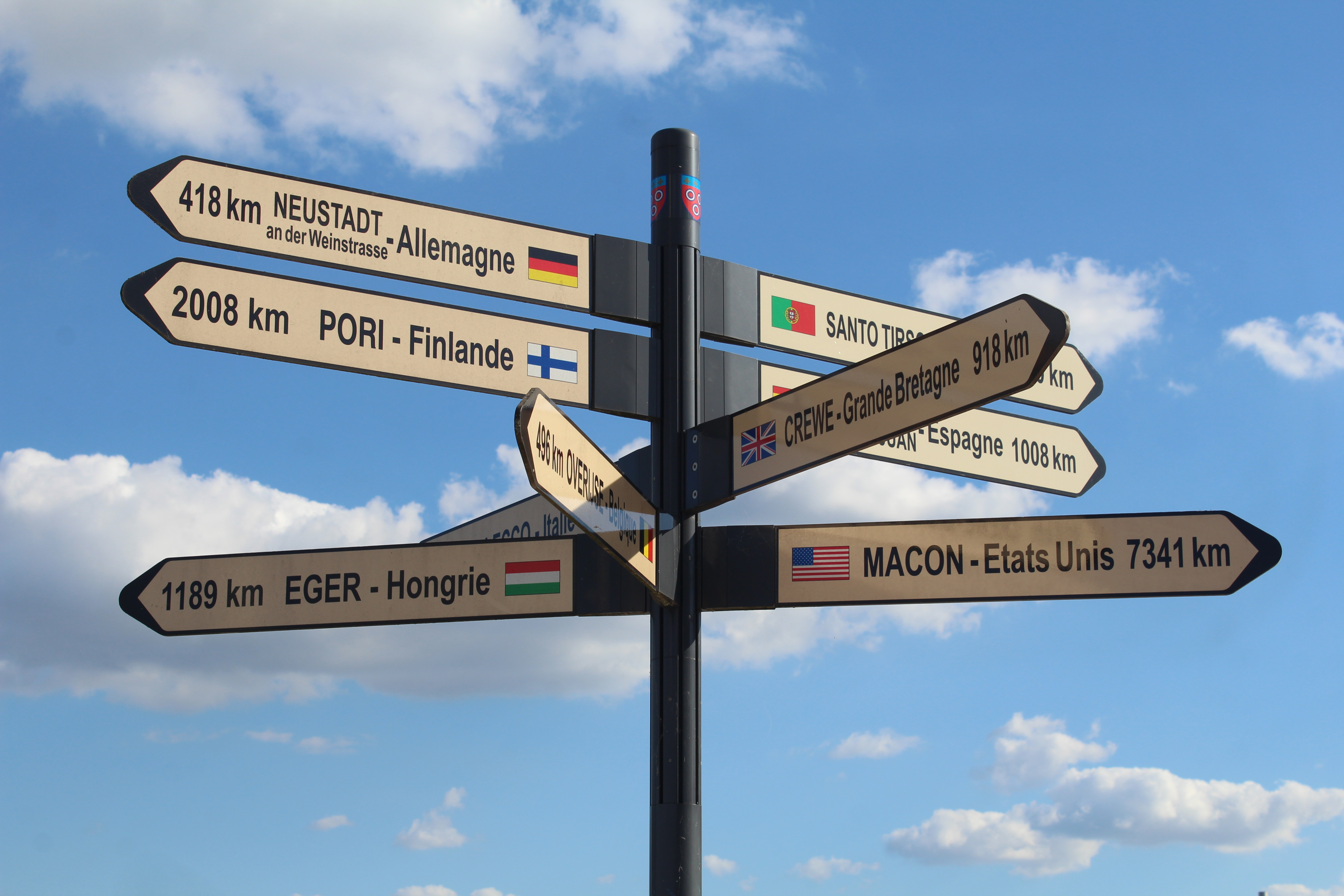 Panneau indiquant les distances entre Mâcon et les villes jumelées à la préfecture de Saône-et-Loire.